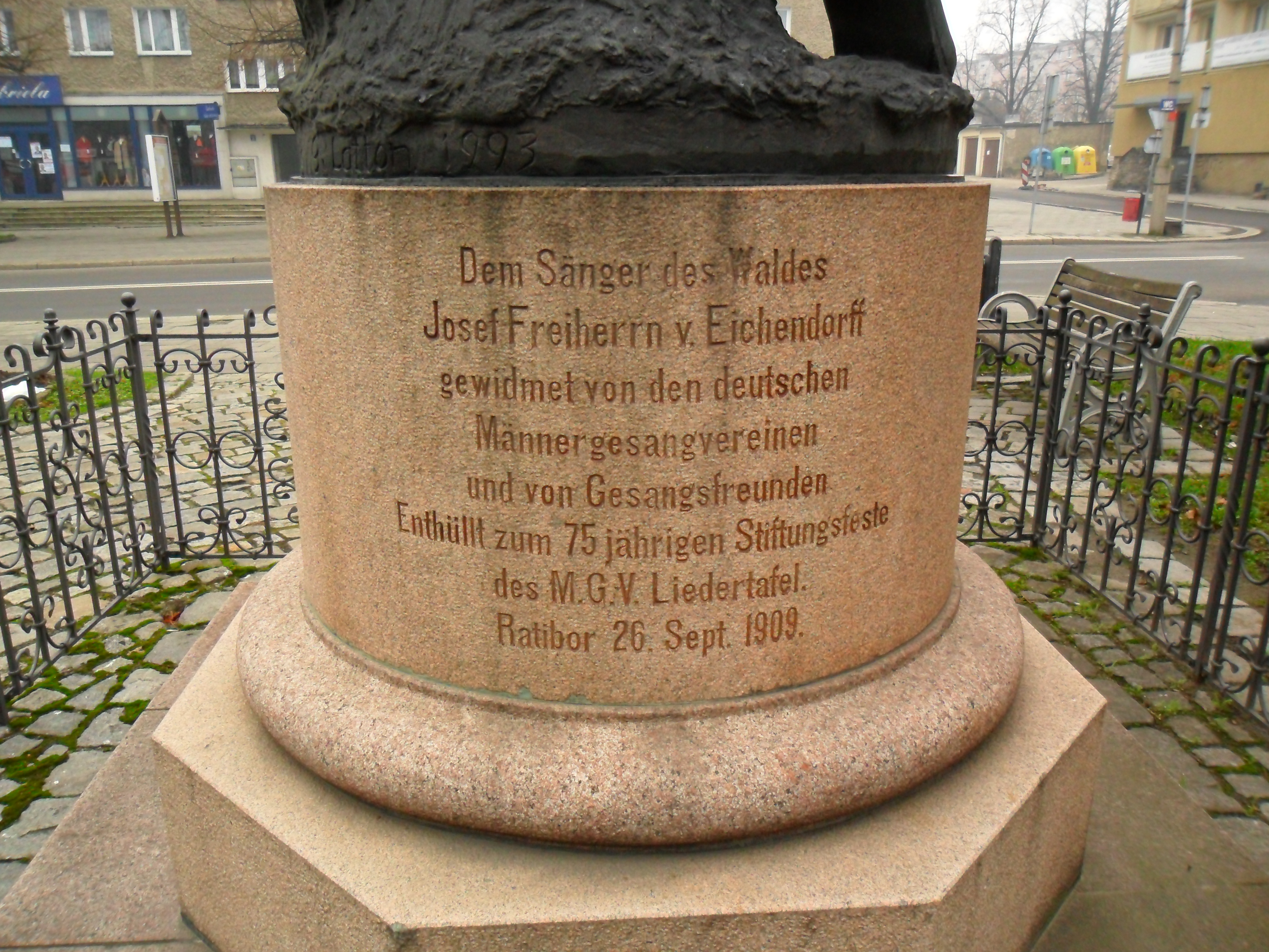 Pomnik Josepha von Eichendorffa w Raciborzu.